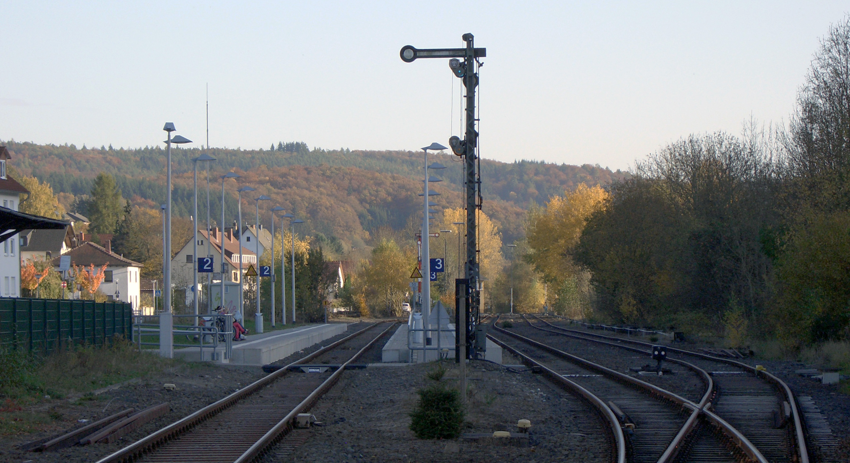 Die Gleisanlagen im Bahnhof Biedenkopf vom Fußgängerüberweg aus gesehen.